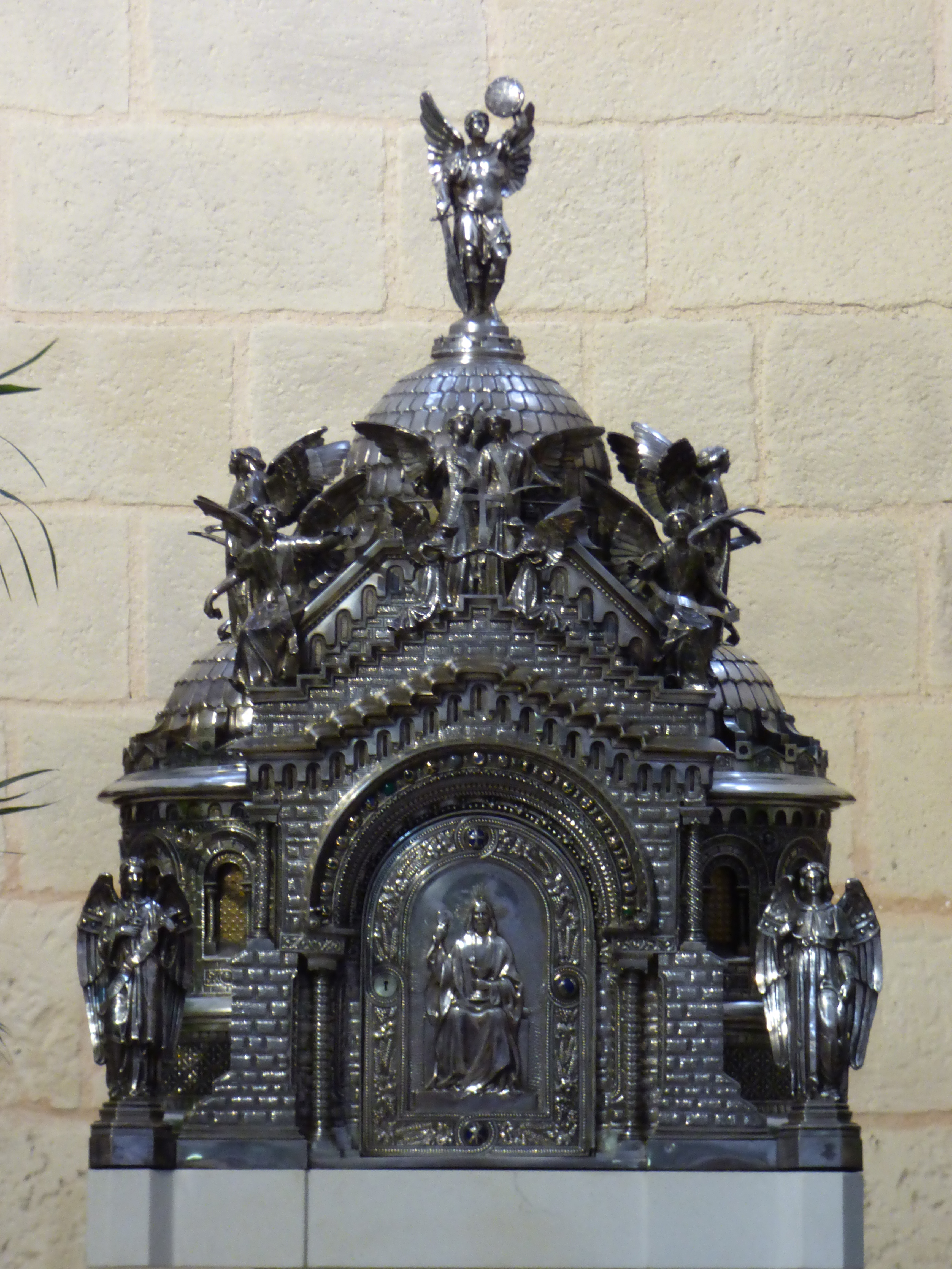 Sagrario del templo parroquial de la Merced de Burgos, anteriormente en el del Sagrado Corazón de Jesús de Gijón. Construido en 1924.